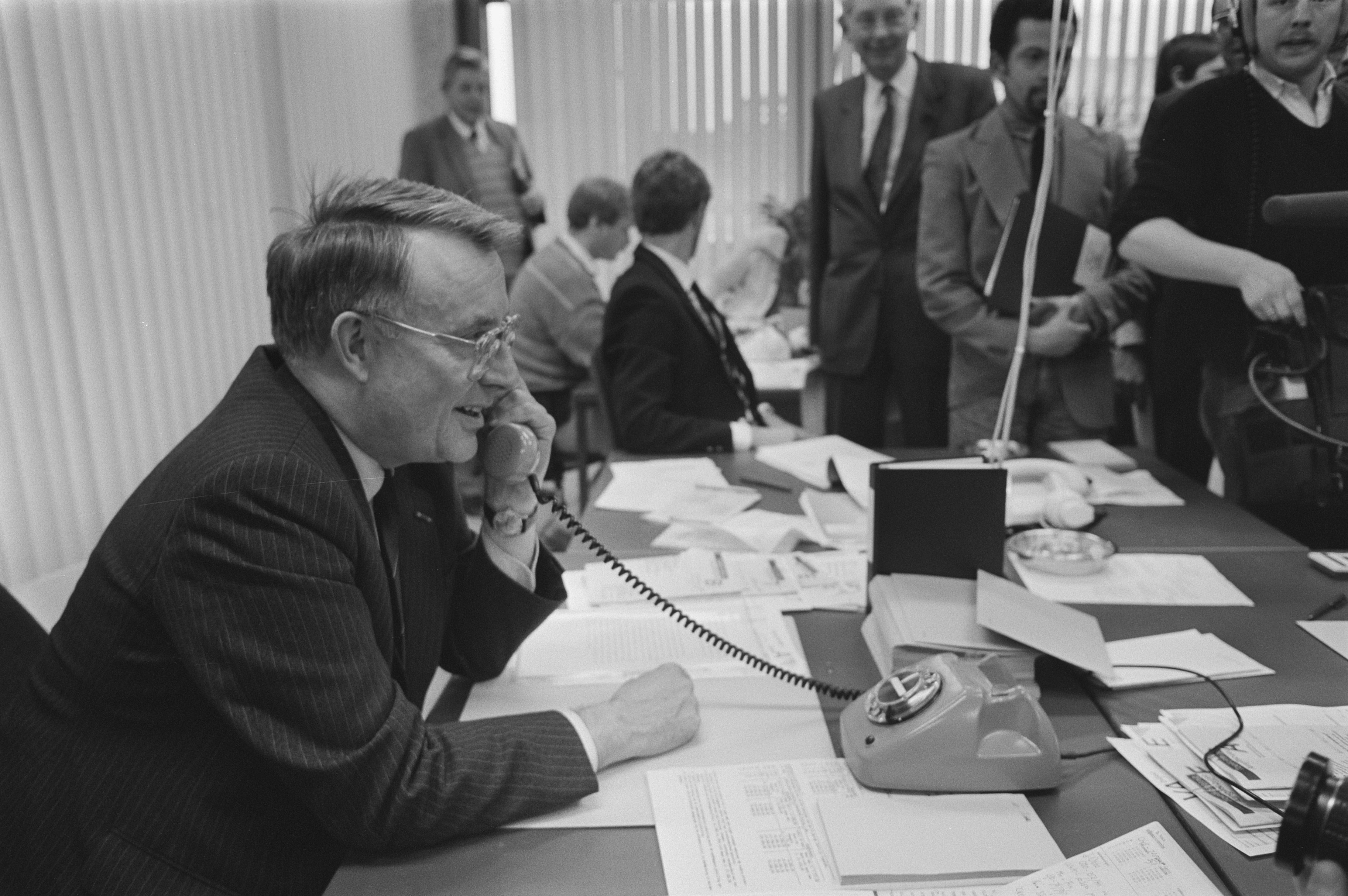 Collectie / Archief : Fotocollectie Anefo Reportage / Serie : [ onbekend ] Beschrijving : Staatssecretaris Koning stelt de belastingtelefoon in gebruik, Koning staat belastingplichtigen te woordop het kantoor van belasting Datum : 1 februari 1985 Locatie : Utrecht Trefwoorden : belastingen, telefoons Persoonsnaam : Koning, Henk Fotograaf : Croes, Rob C. / Anefo Auteursrechthebbende : Nationaal Archief Materiaalsoort : Negatief (zwart/wit) Nummer archiefinventaris : bekijk toegang 2.24.01.05 Bestanddeelnummer : 933-2224